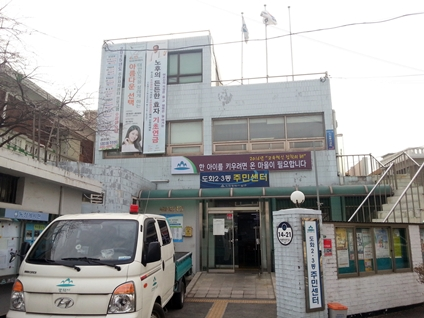 도화 2·3동 주민센터